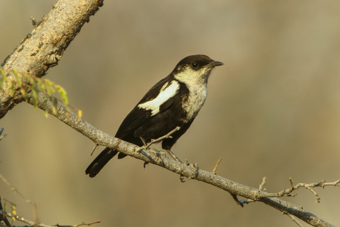 Arnot's Chat - Zambesi - Namibia_0016